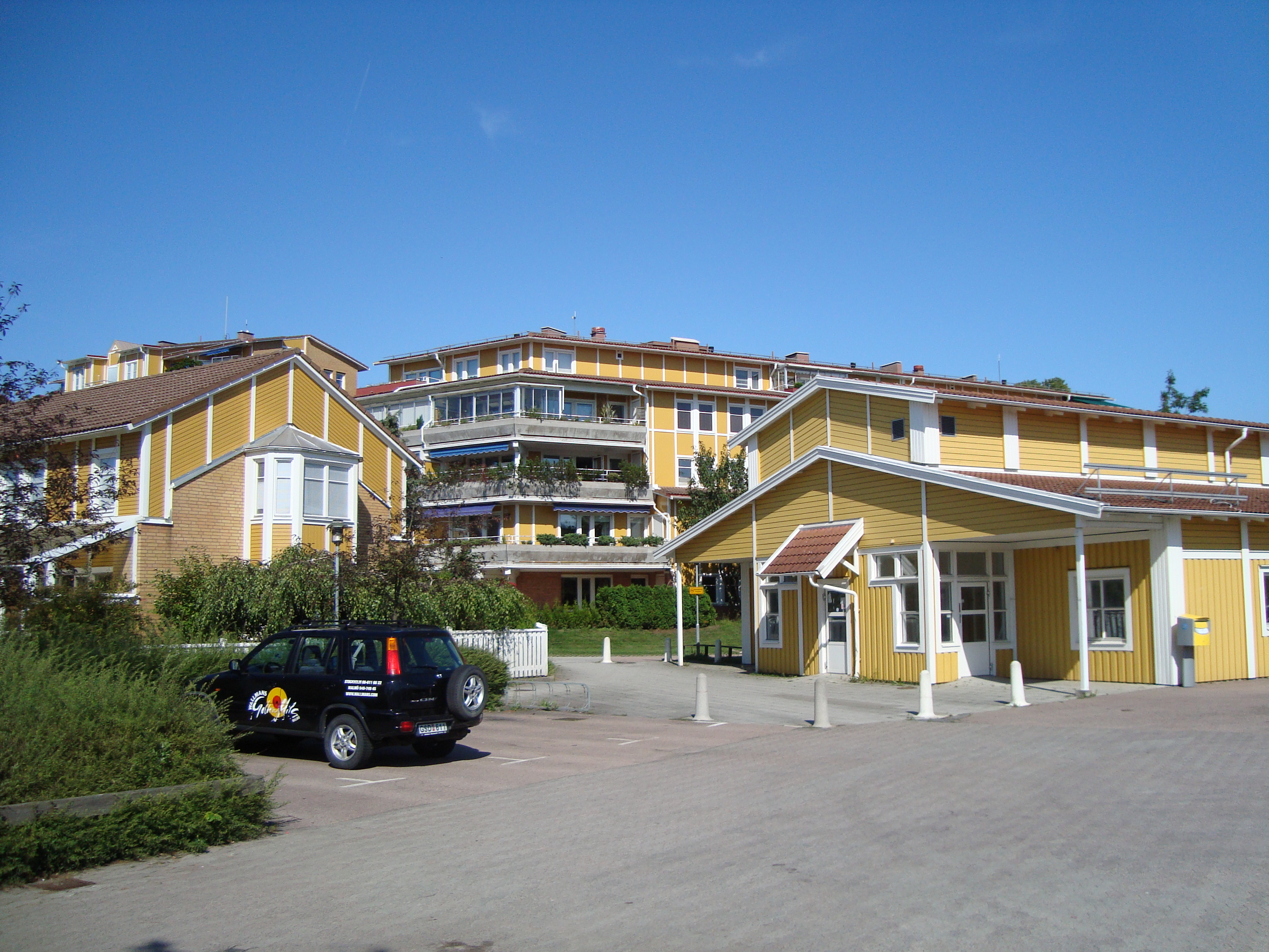 Bostadsområde i Ramlösa i Helsingborg.